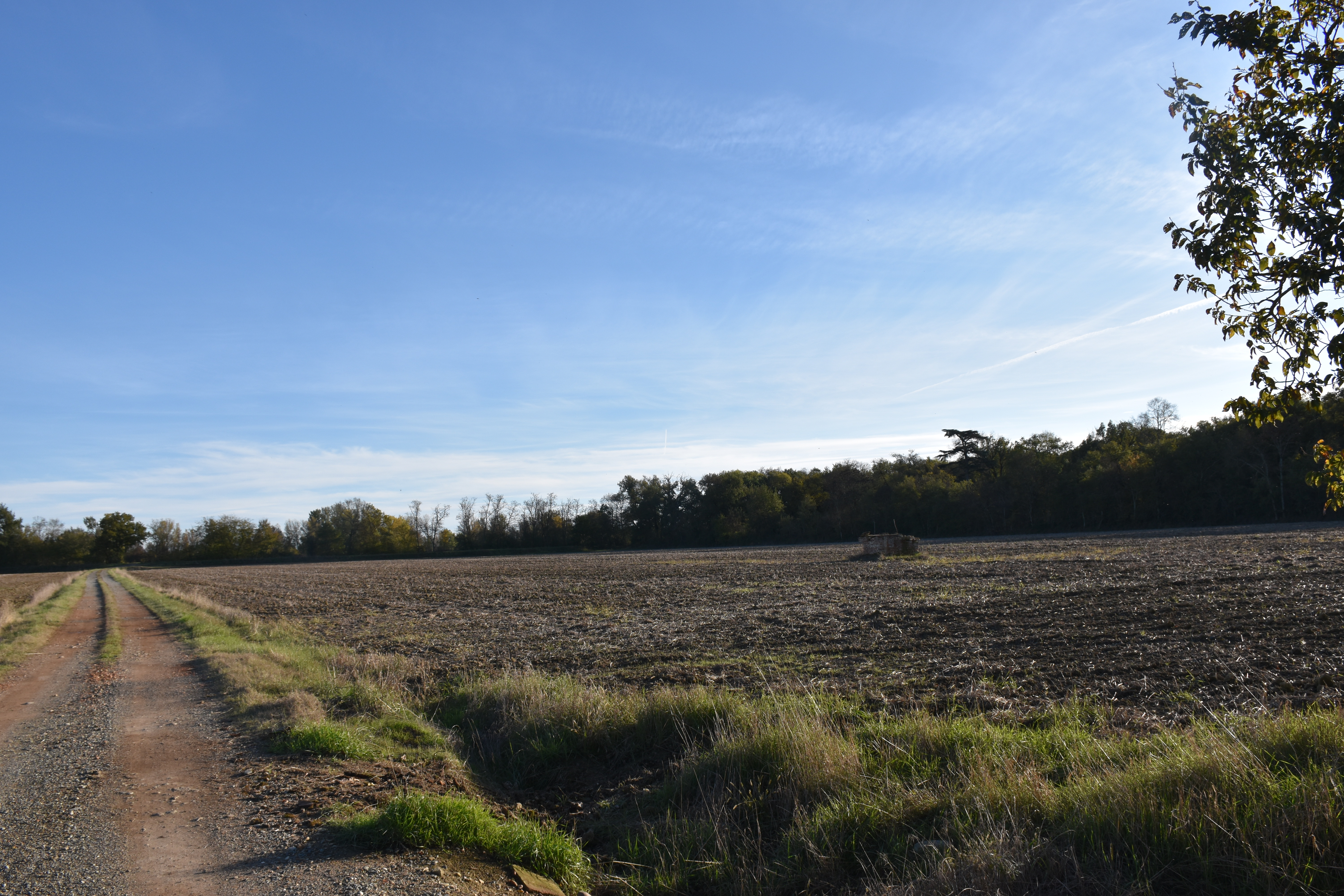 Garenne ou ancien Jardin potager du domaine d'Esquiré, à Fonsorbes (Haute-Garonne) où furent dissimulés 35 tonnes de matériel militaire, par jean d'Aligny, de 1940 ou 1941 à 1945